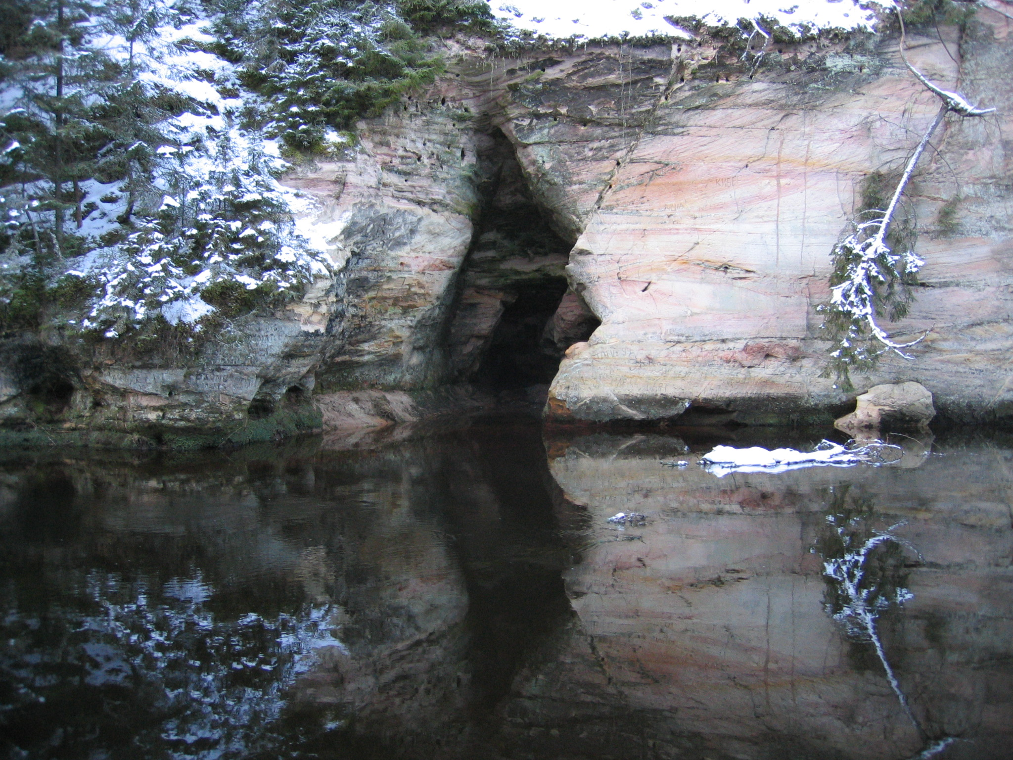 Neitsikoobas Väikese Taevaskoja kaljus peegeldusega Ahja jõe veelt